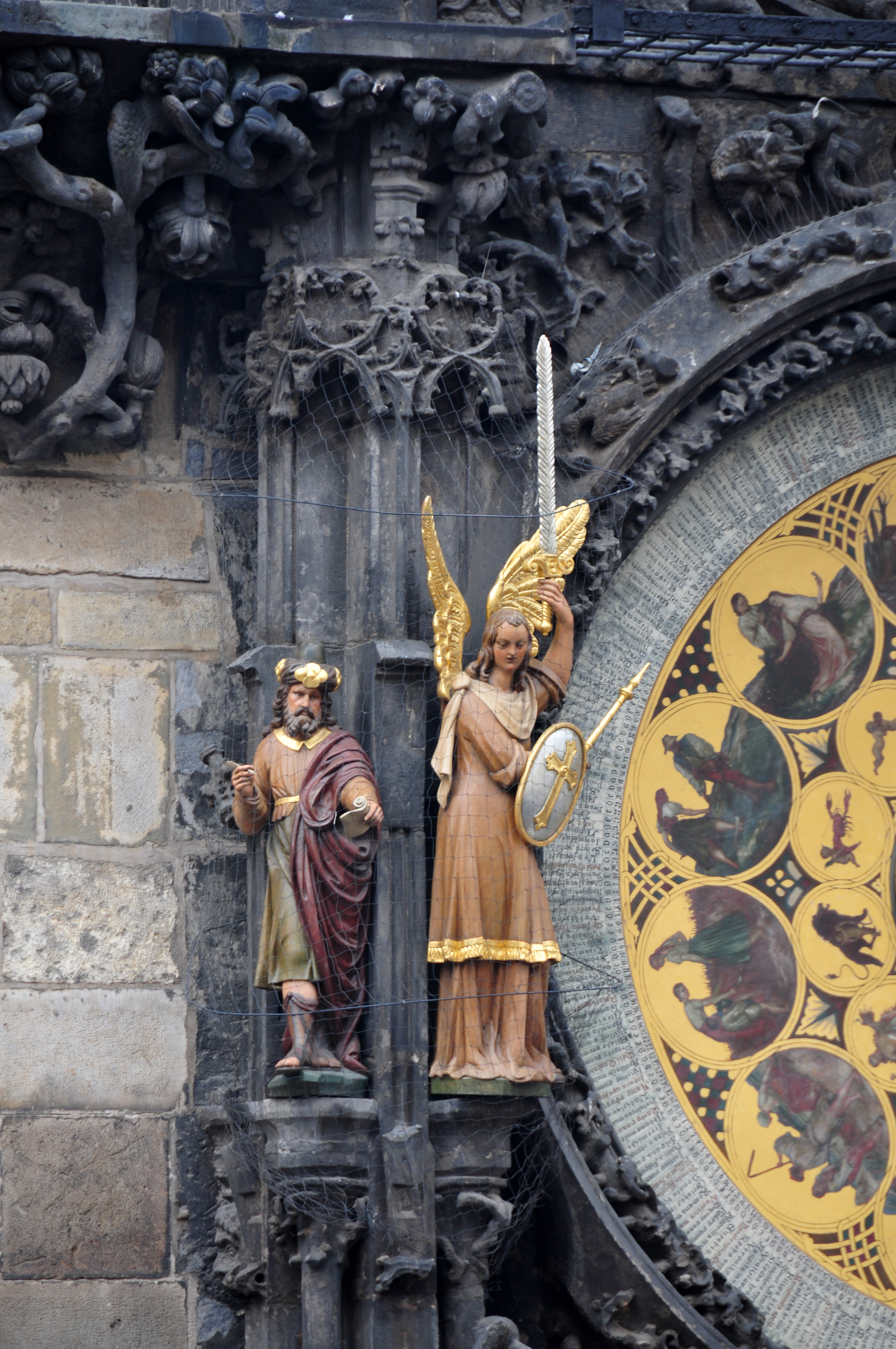 Prag